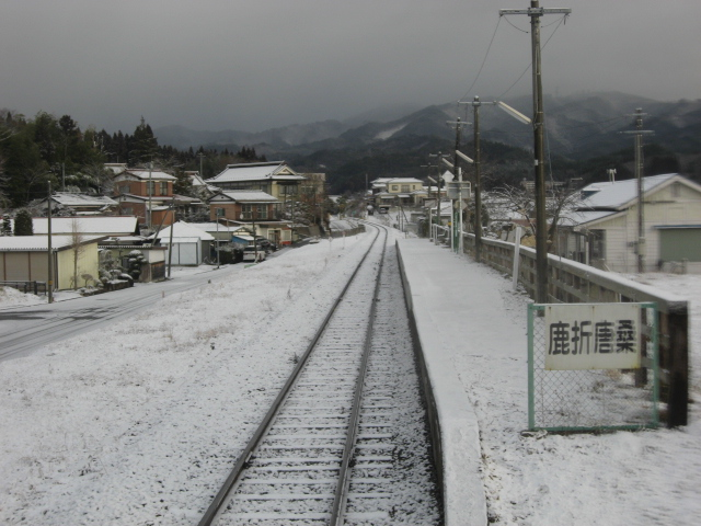 鹿折唐桑駅ホーム